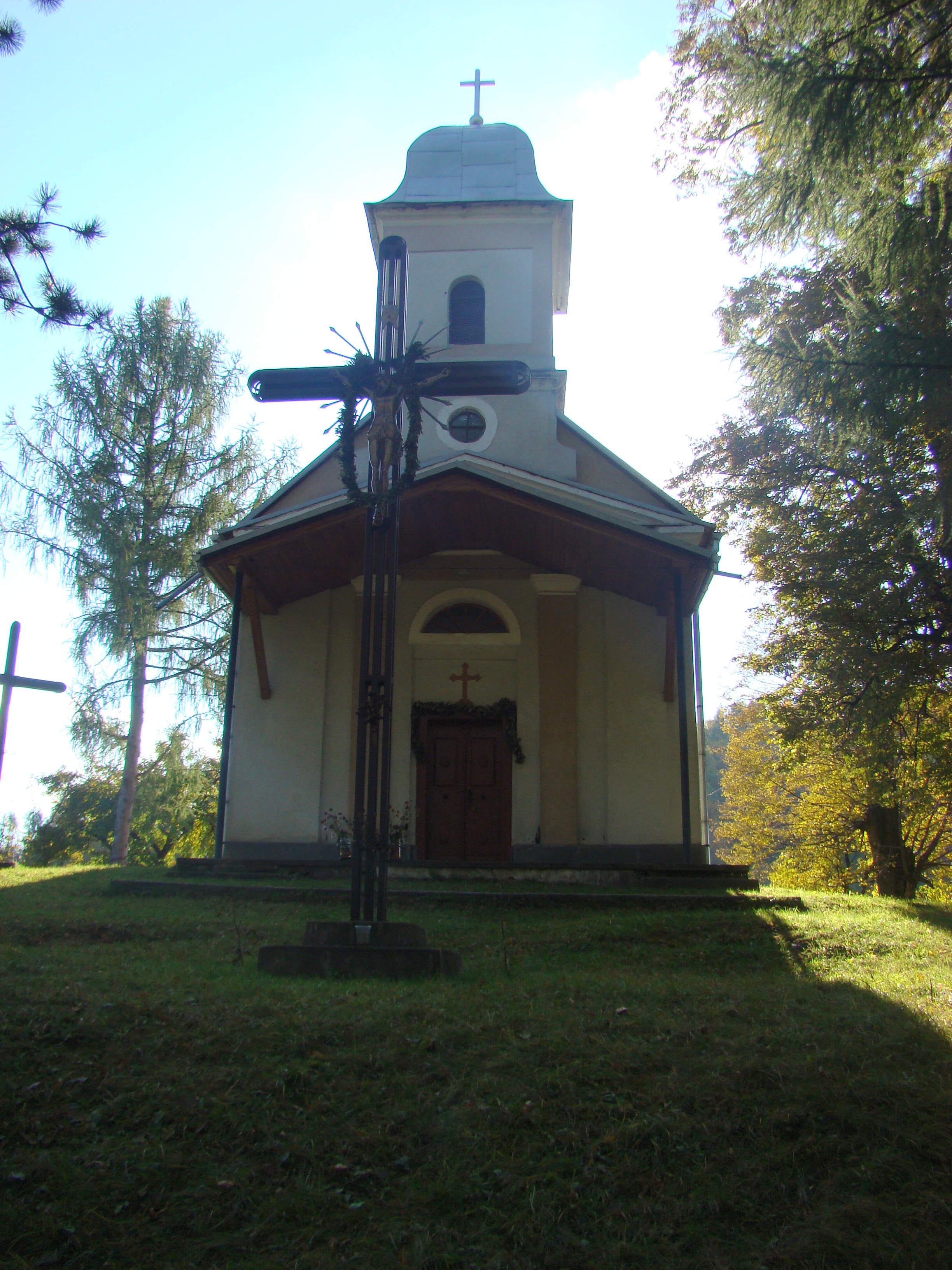 Capelele din "Calea Crucii", sat Coștiui; comuna Rona de Sus